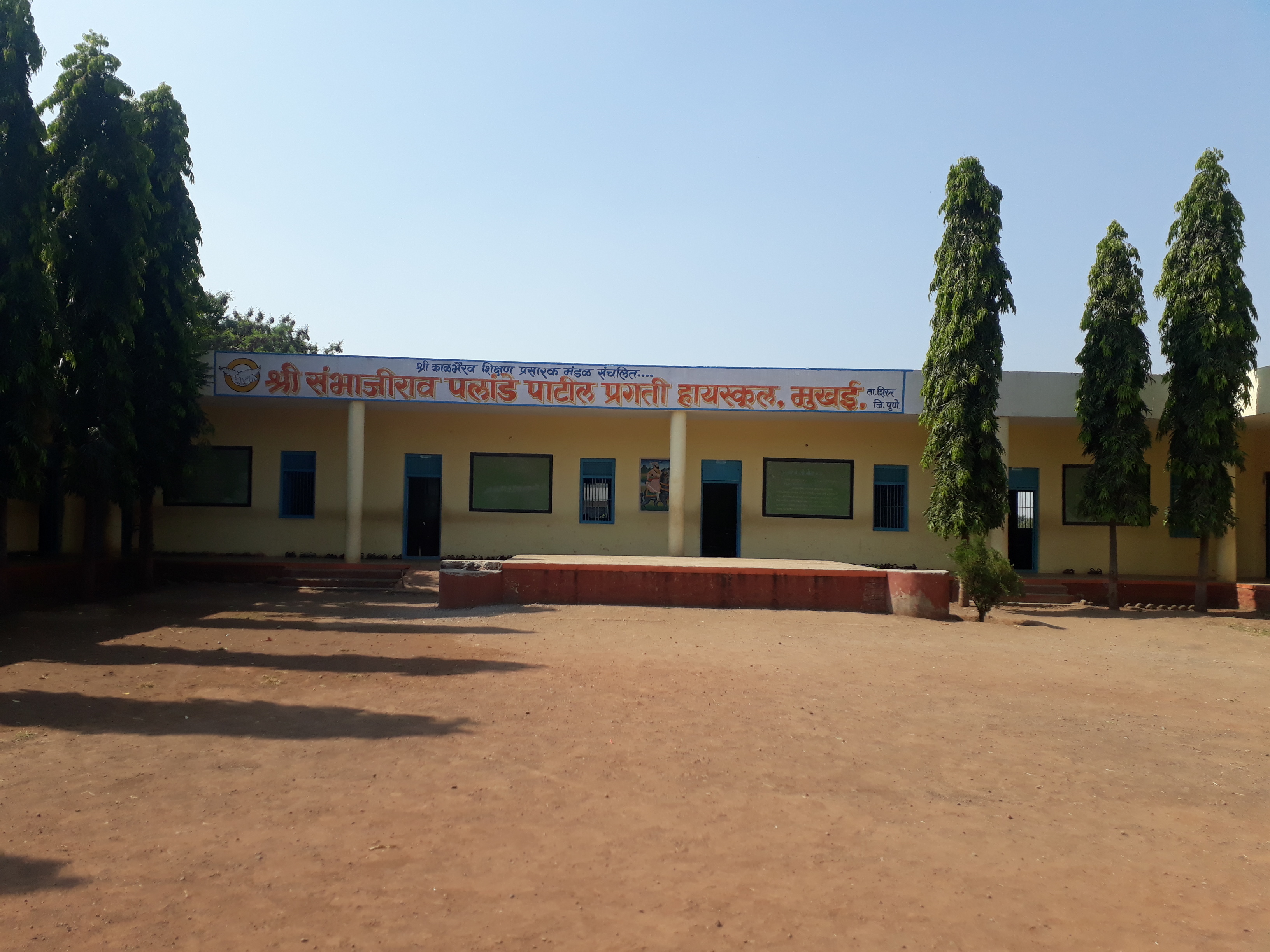 photo